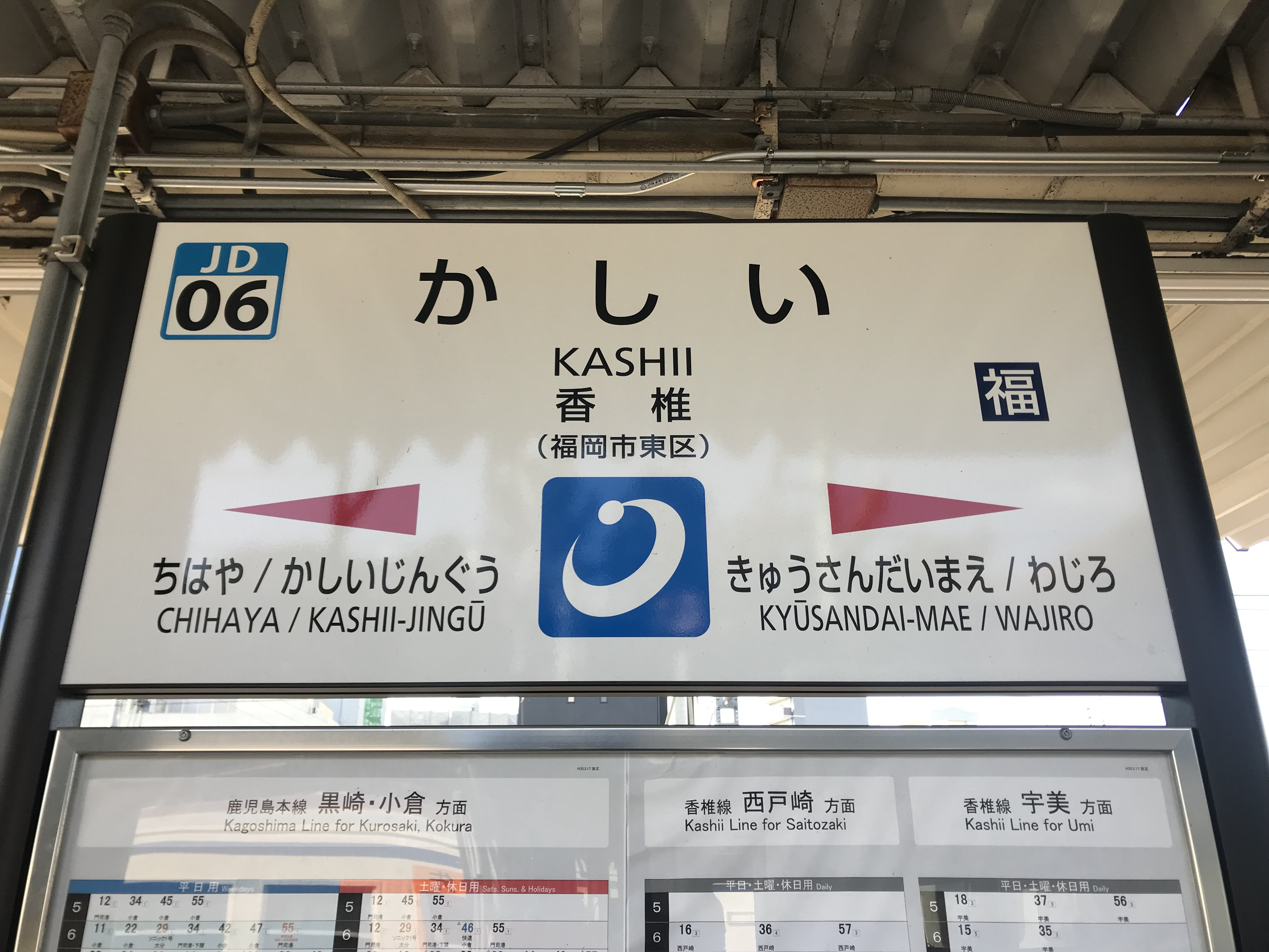 香椎駅の駅名標。イラストは福岡市東区の区章